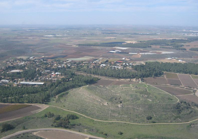 Tel Lakiš